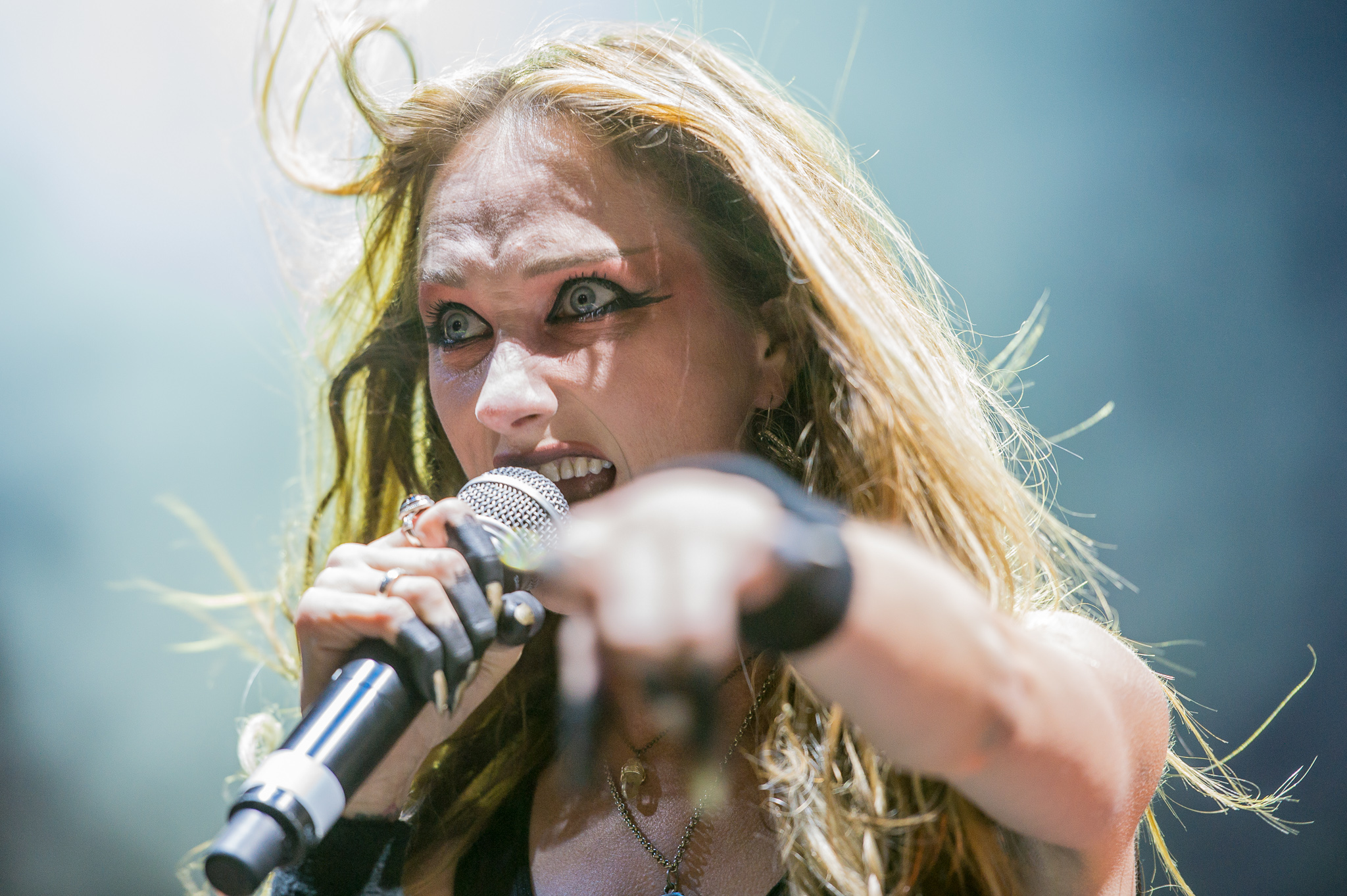 ARGO-Konzerte,Arena Nürnberger Versicherungen,Clubstage,Huntress,Jill Janus,Konzert,Livekonzert,Livemusik,Musik,RiP,Rock im Park 2014